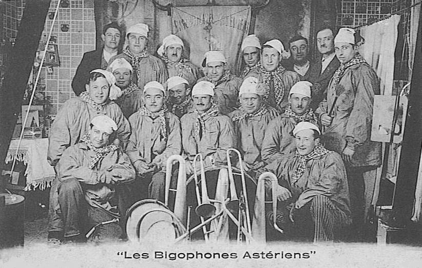 Les bigophones astériens dans les années 1920.